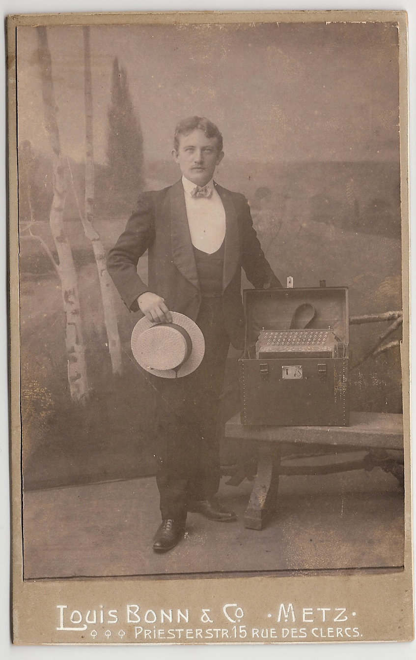 Foto di Giovanni Gagliardi a Metz nel 1906